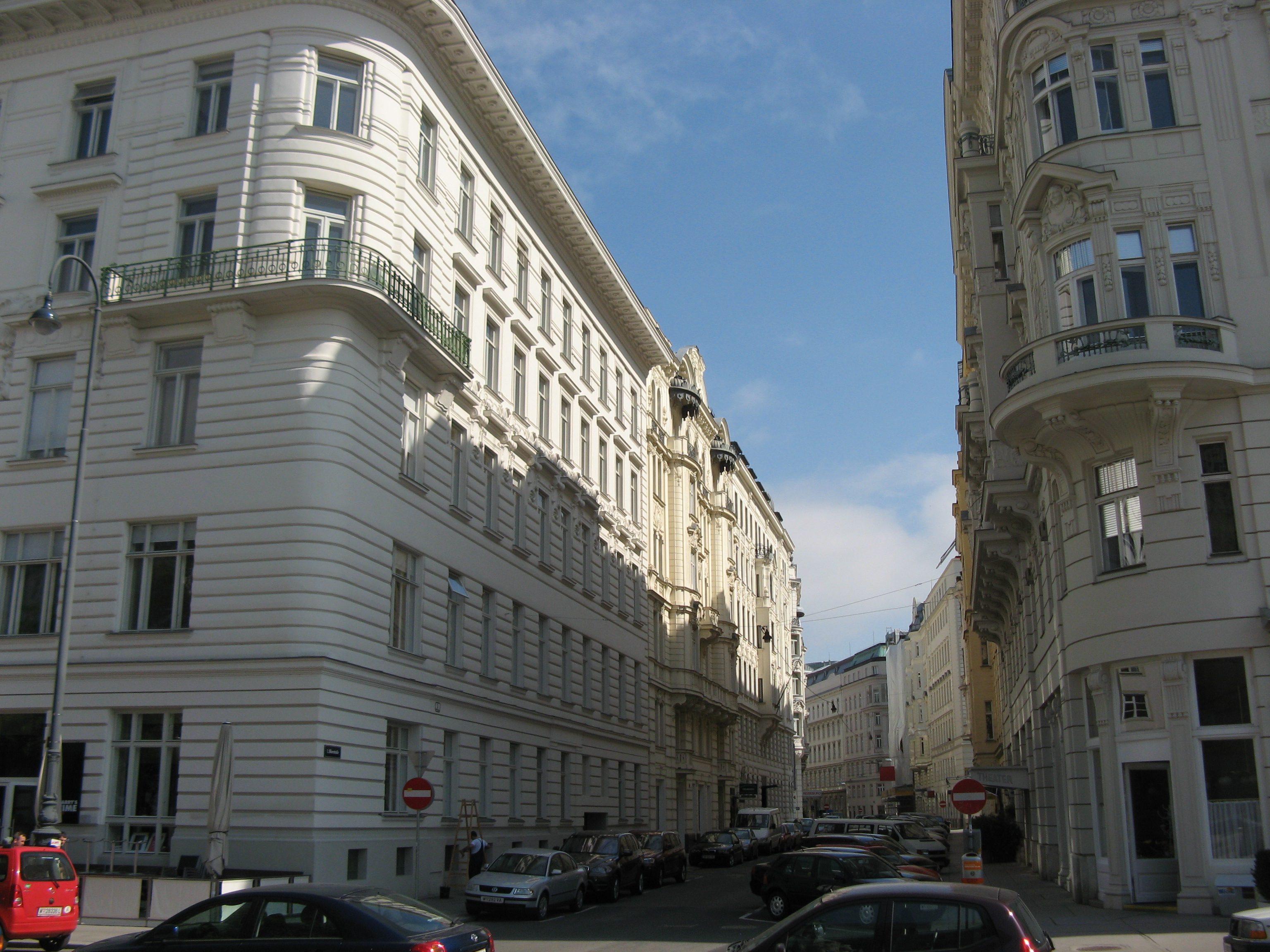 Biberstraße vom Dr.-Karl-Lueger-Platz nach Norden, Wien-Innere Stadt